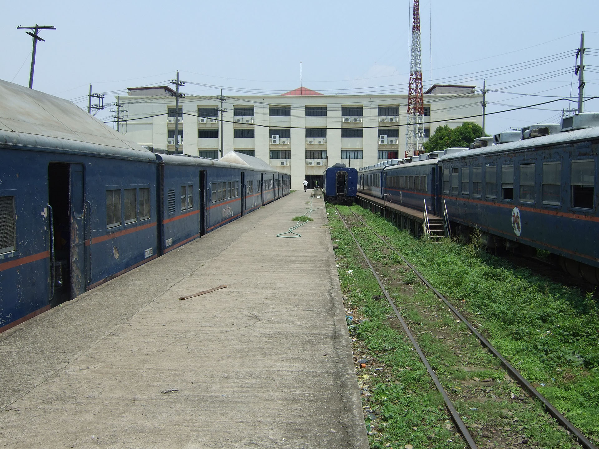 Tayuman station (Philippine National Railways in Manila)